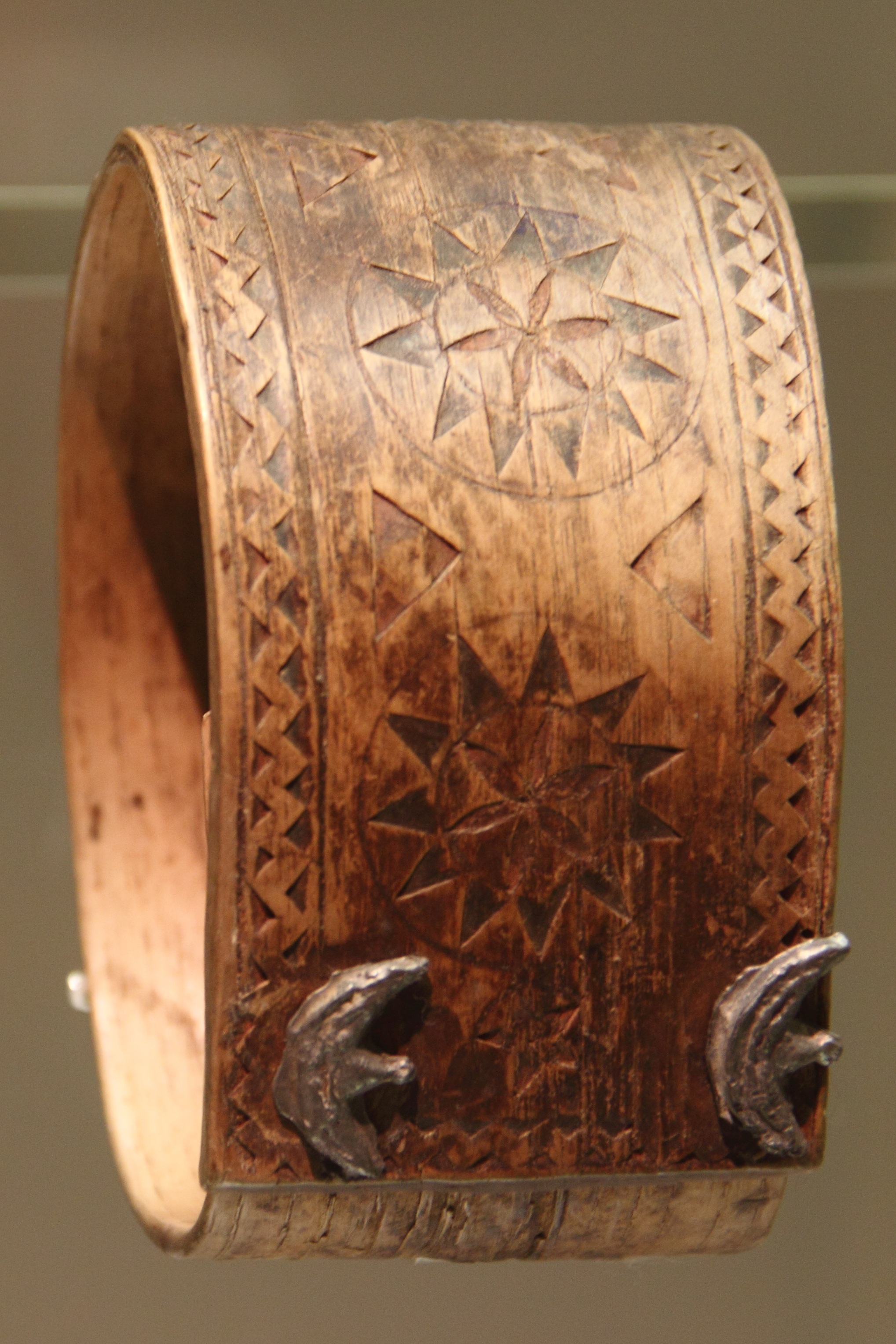 en bois, orné de clous en cuivreUnknownUnknown marro lepokoak zurez, kobrezko edo eztainuzko itzekin edertua eta kanitaz egin ohizko itxurar ornitua xix memdra, zuberoa baionako euskal museoa